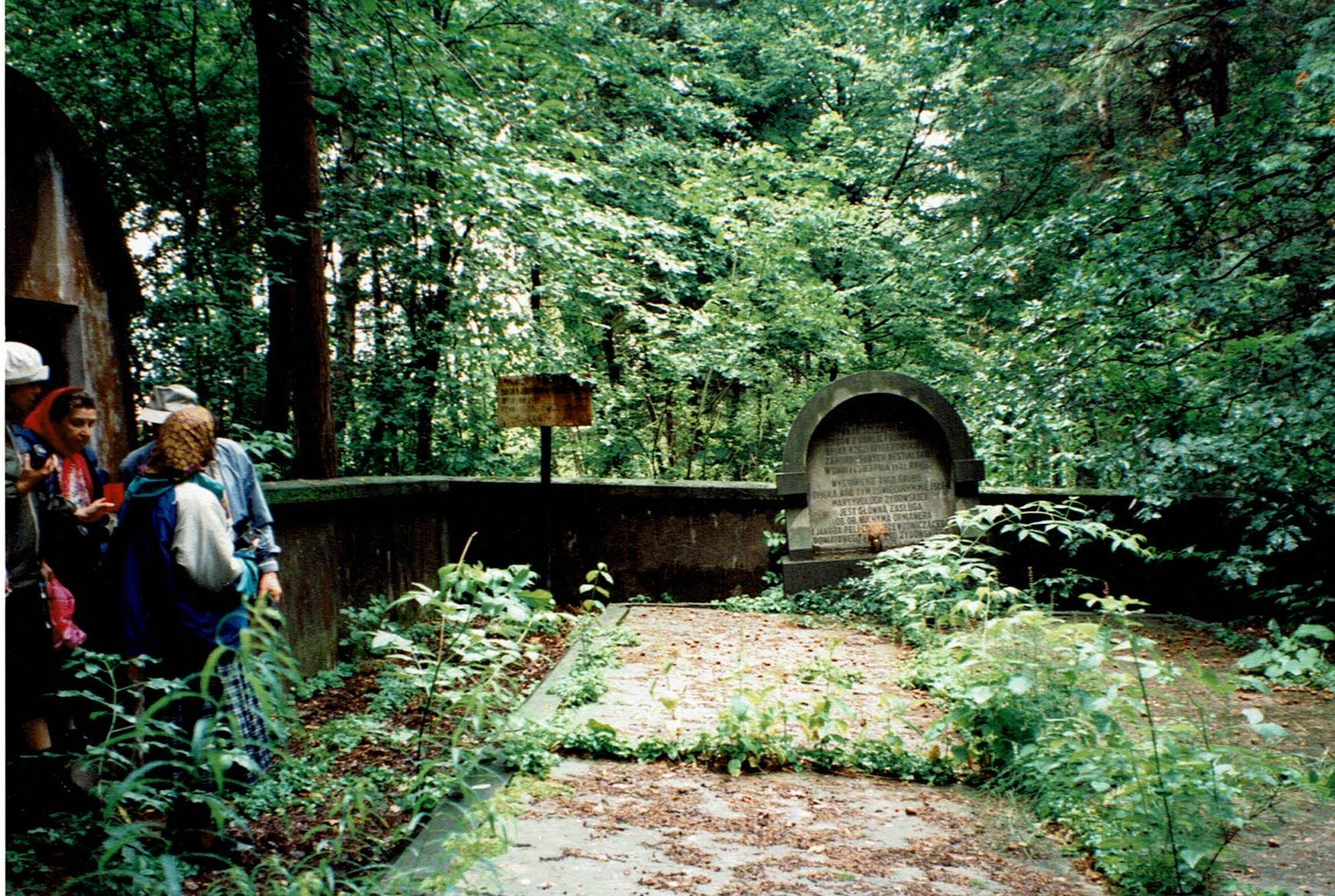 המצבה על קבר האחים בגארבץ, צולם בעת ביקור באתר ב-1996